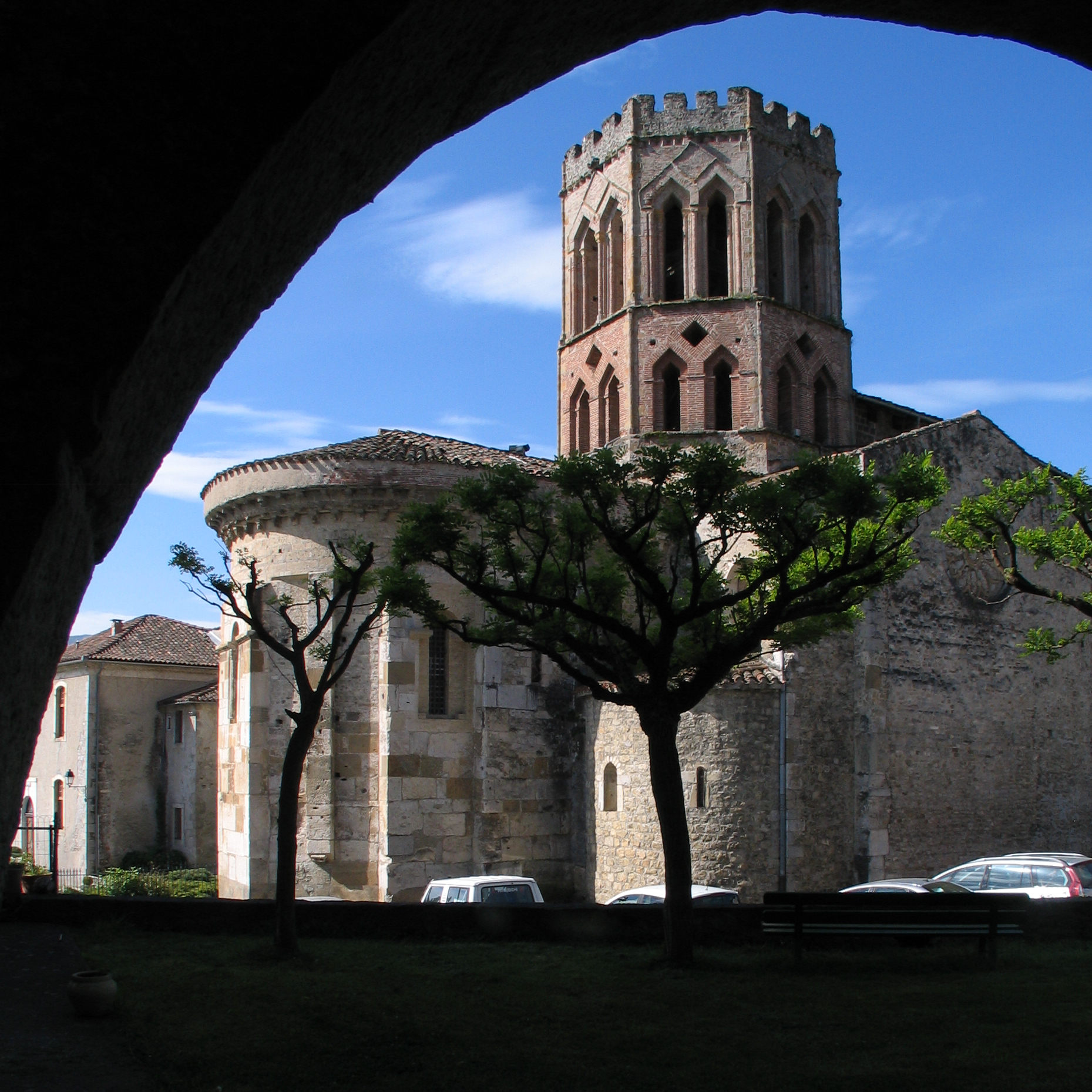 Cathédrale Saint-Lizier - Saint-Lizier